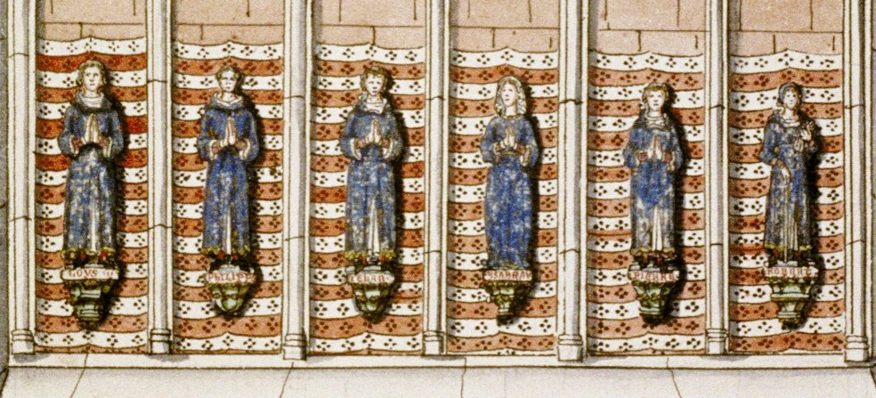 Ludvík, Filip, Jan, Isabela, Petr a Robert - děti Ludvíka IX.R